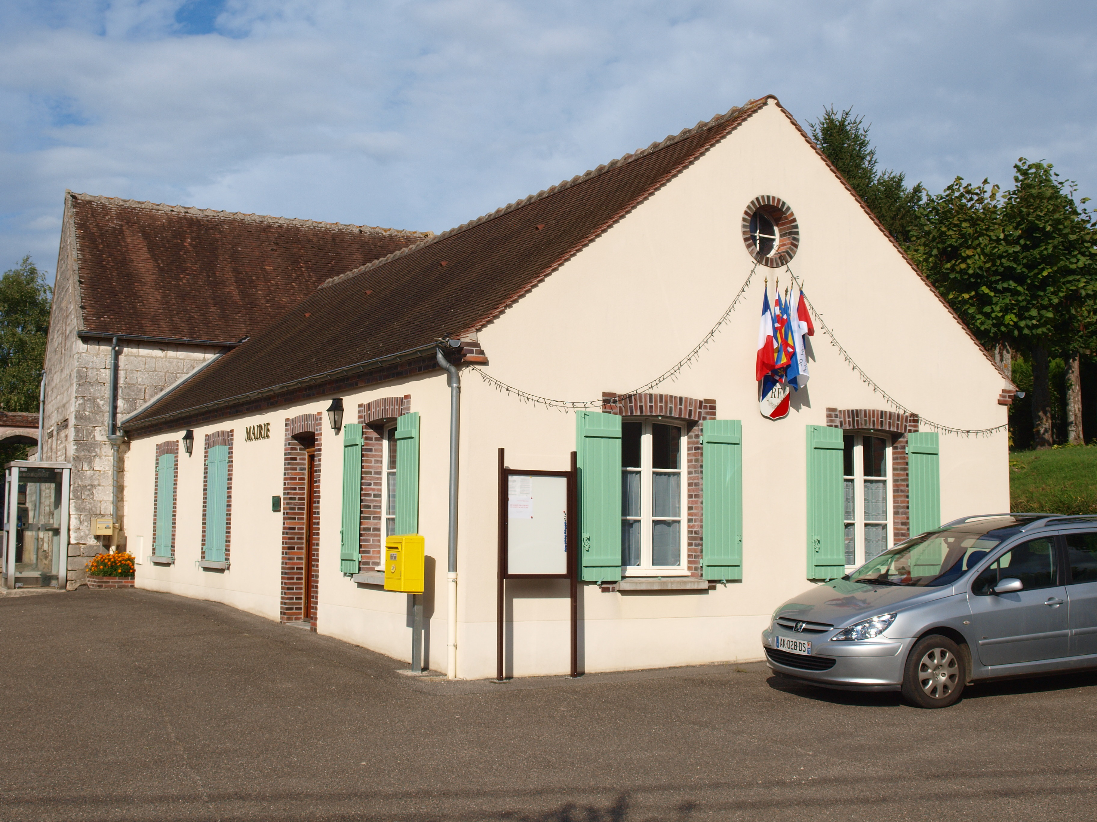 Plessis-Saint-Jean (Yonne, France) ; mairie